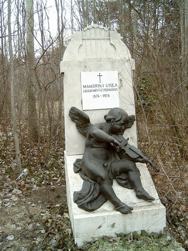 Mambriny Gyula (Budapest, 1874. febr. 23. – Budapest, 1928. jan. 16.) hegedűművész és pedagógus sírja Budapesten. Kerepesi temető: 51-1-99.